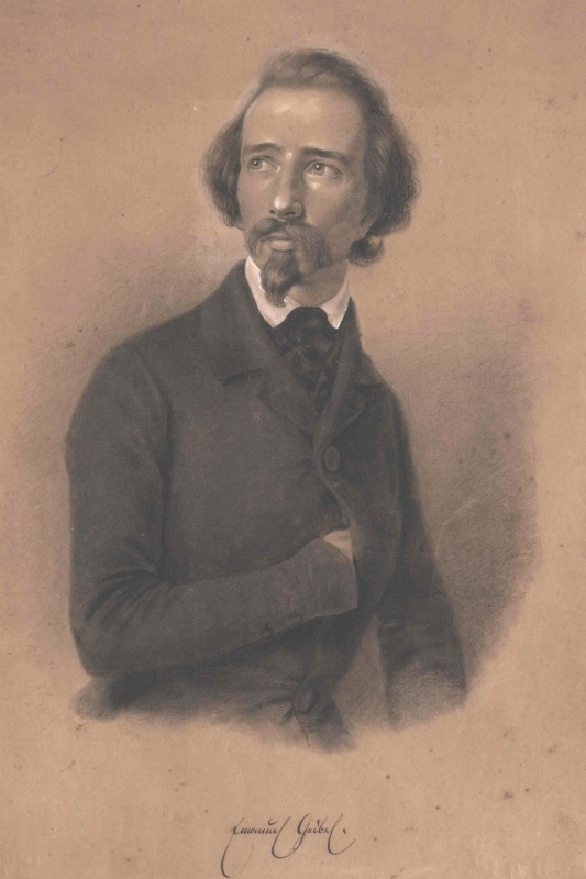 Emanuel Geibel (1815–1884)